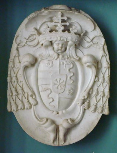 Blason du cardinal Pierre de Bonsi, exposé dans l'escalier du palais des archevêques de Narbonne.